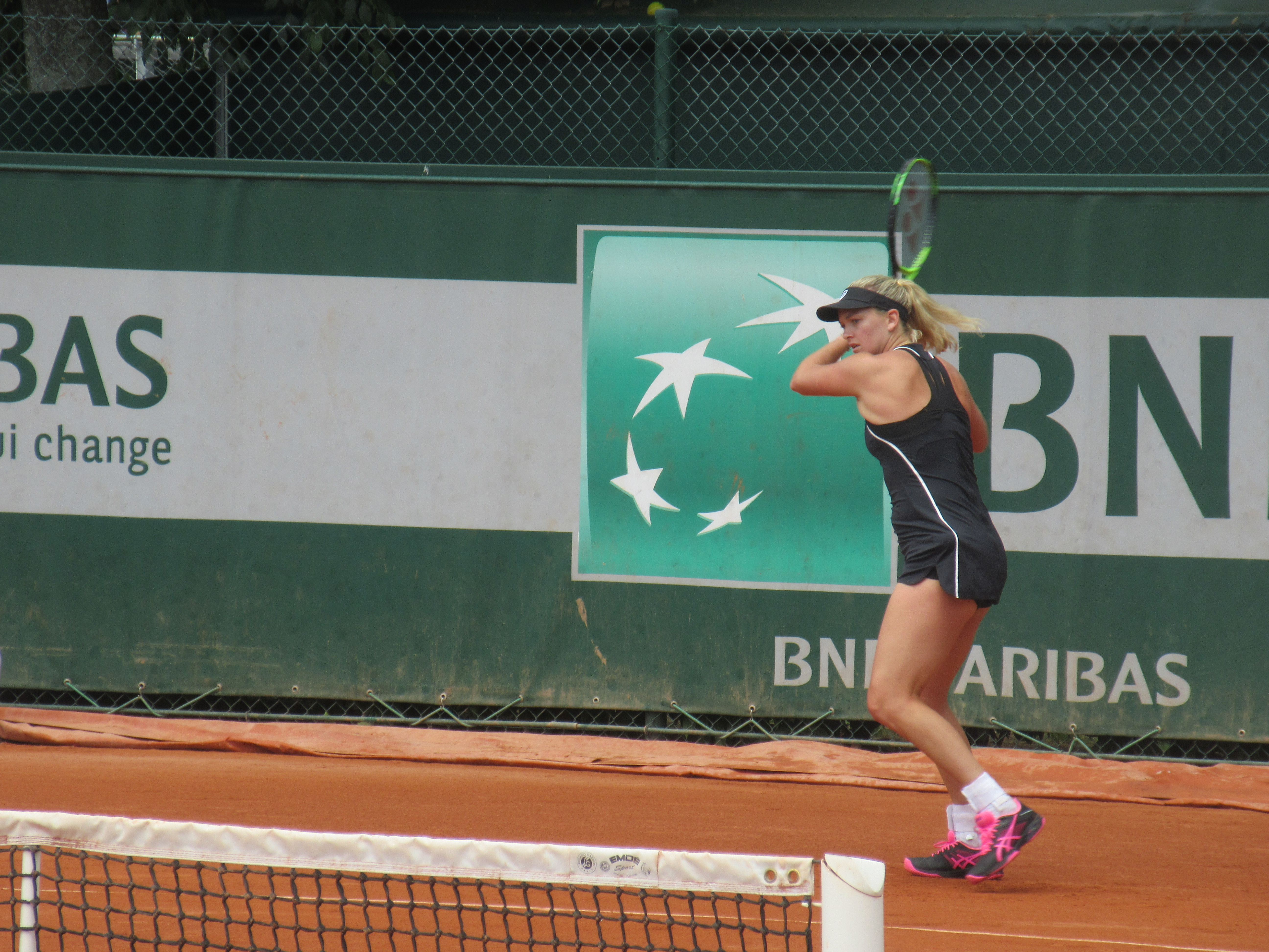 Coco Vandeweghe à Roland-Garros en 2018